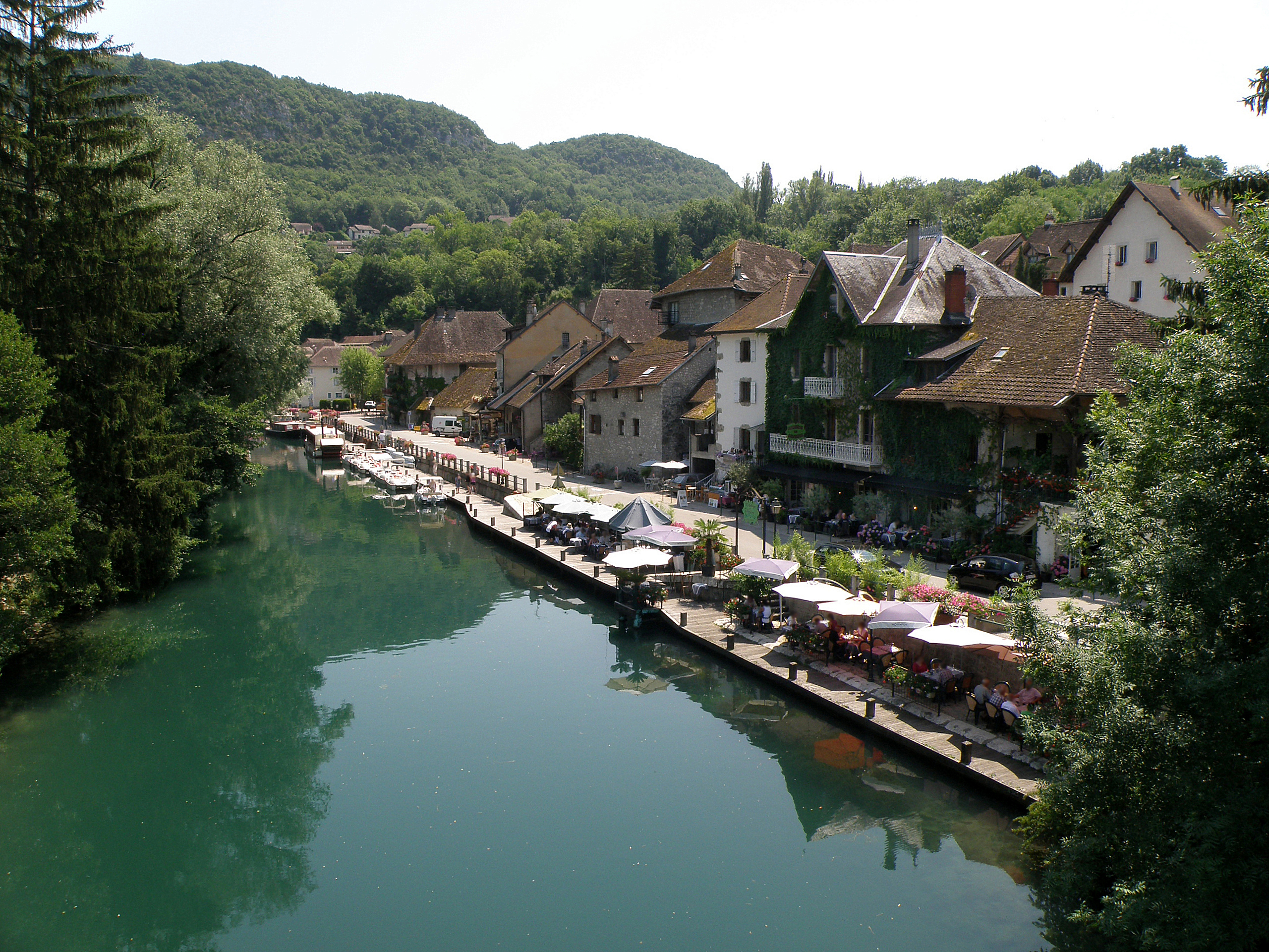 Chanaz, comm. de la Savoie (région Rhône-Alpes, France). Aspect du bourg-centre, avec le canal de Savières. Vue prise depuis la passerelle.